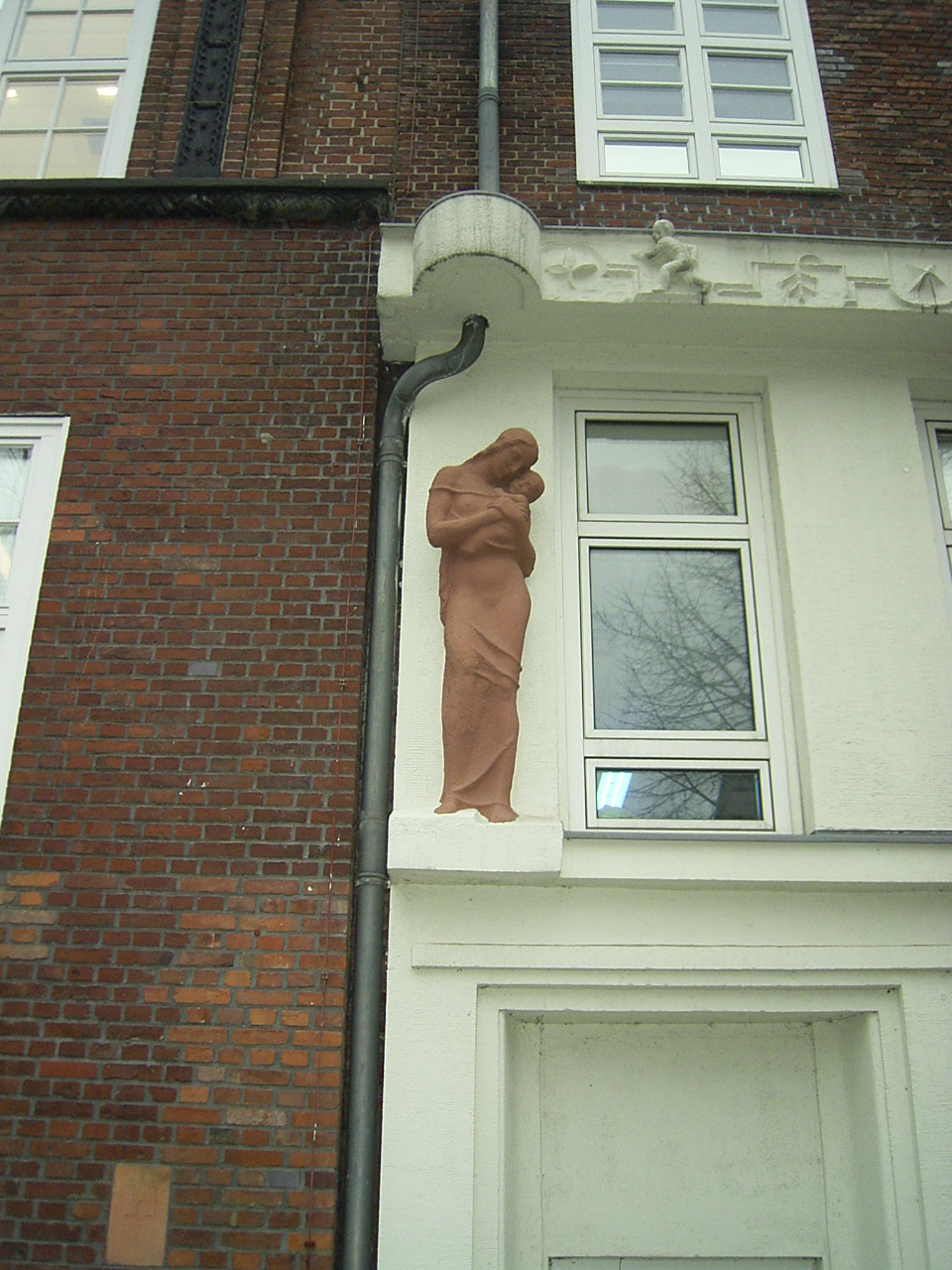 Skulptur Mutterliebe von Richard Kuöhl am ehemaligen Kinderkrankenhaus in der Marckmannstraße in Rothenburgsort